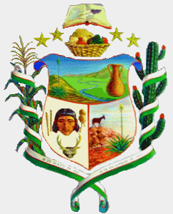 Escudo del municipio Urdaneta. Estado Lara. Venezuela